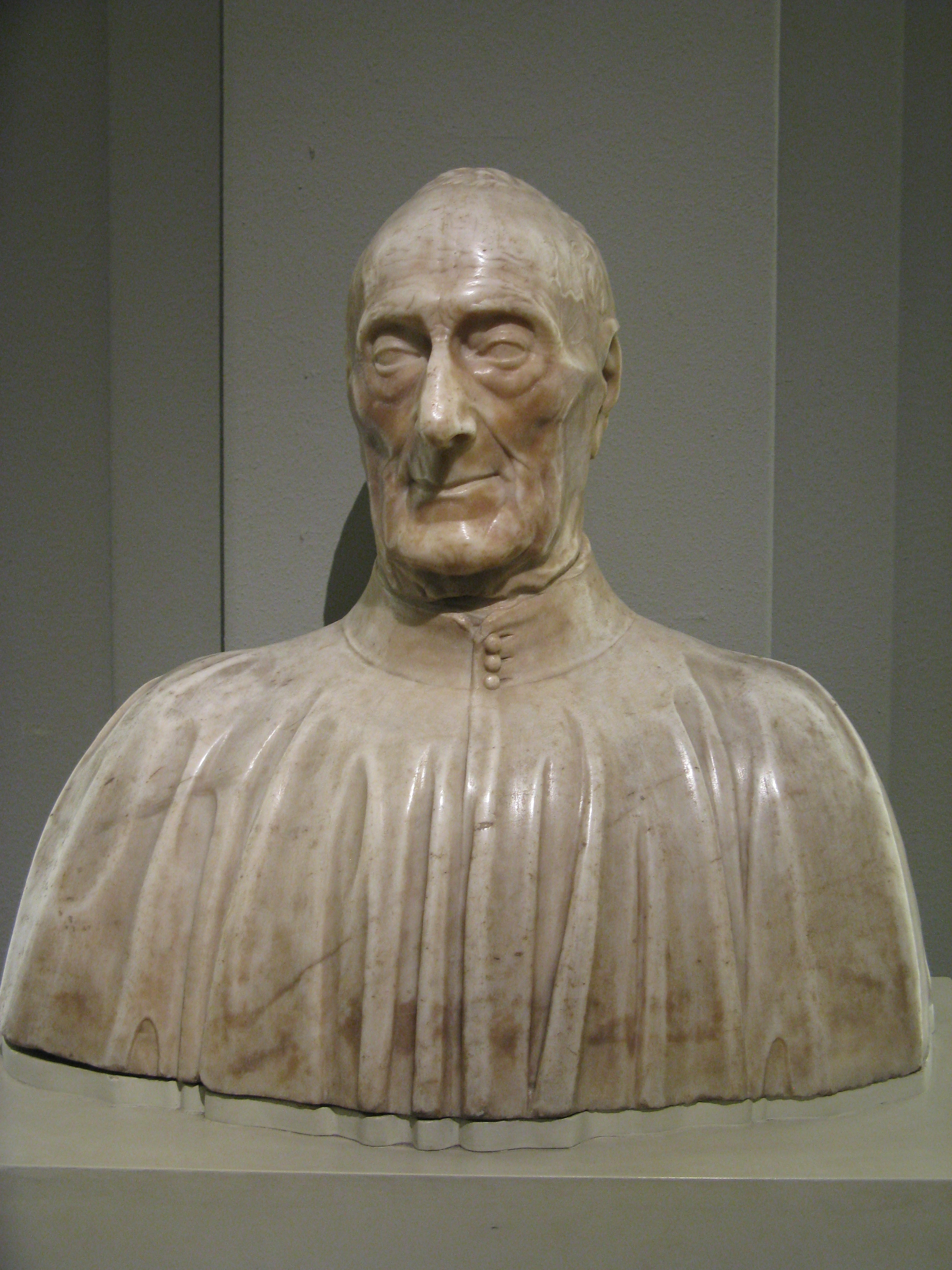 Figürliche Büste des Arztes